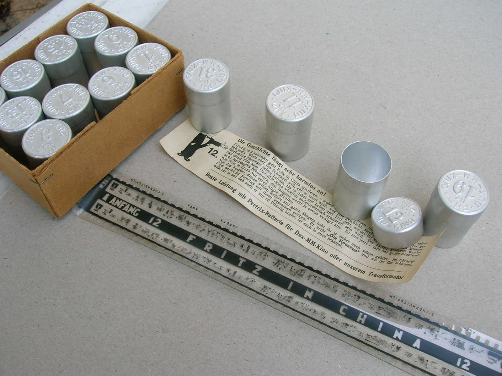 Dux-Kino